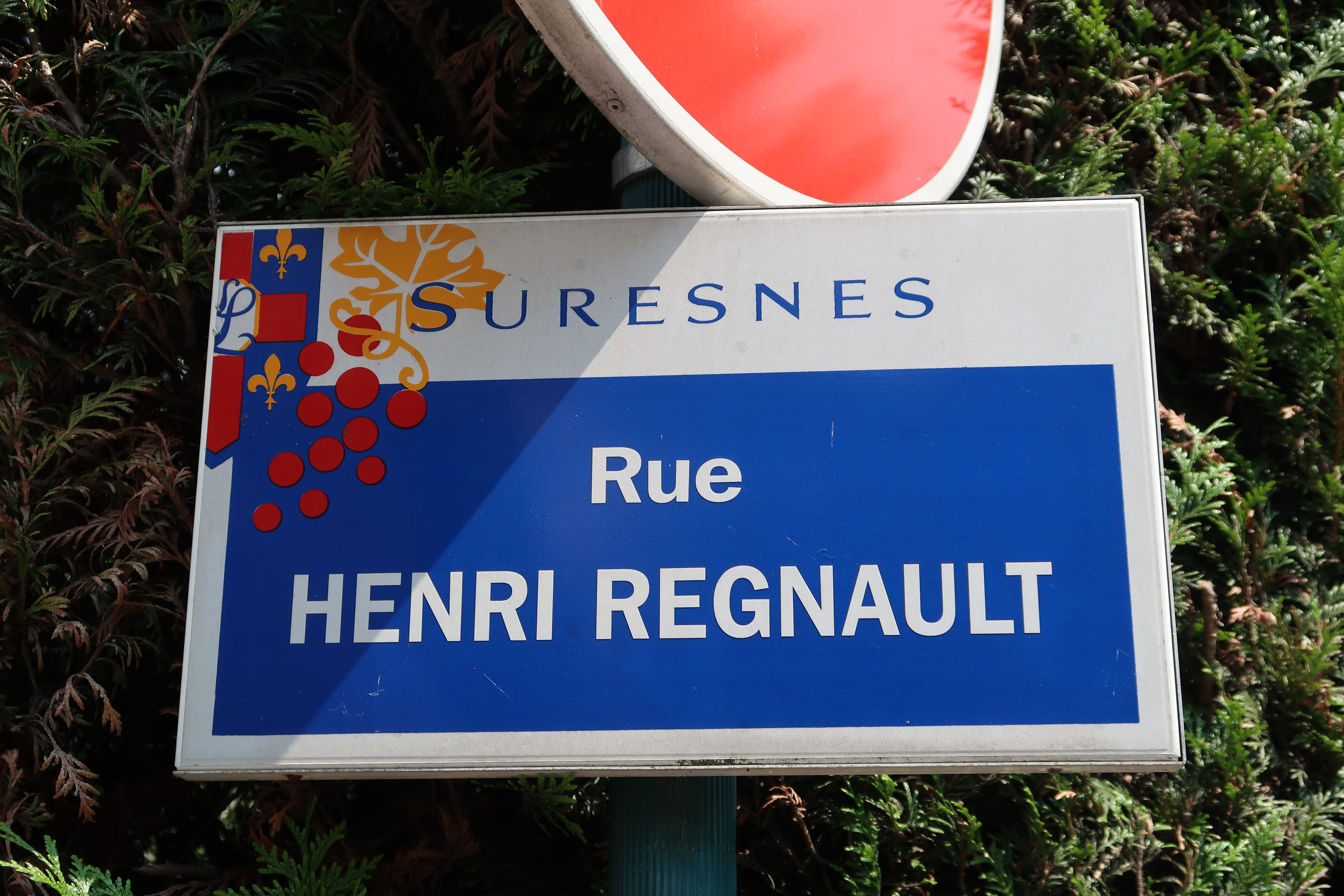 Plaque de la rue Henri-Regnault à Suresnes (Hauts-de-Seine).